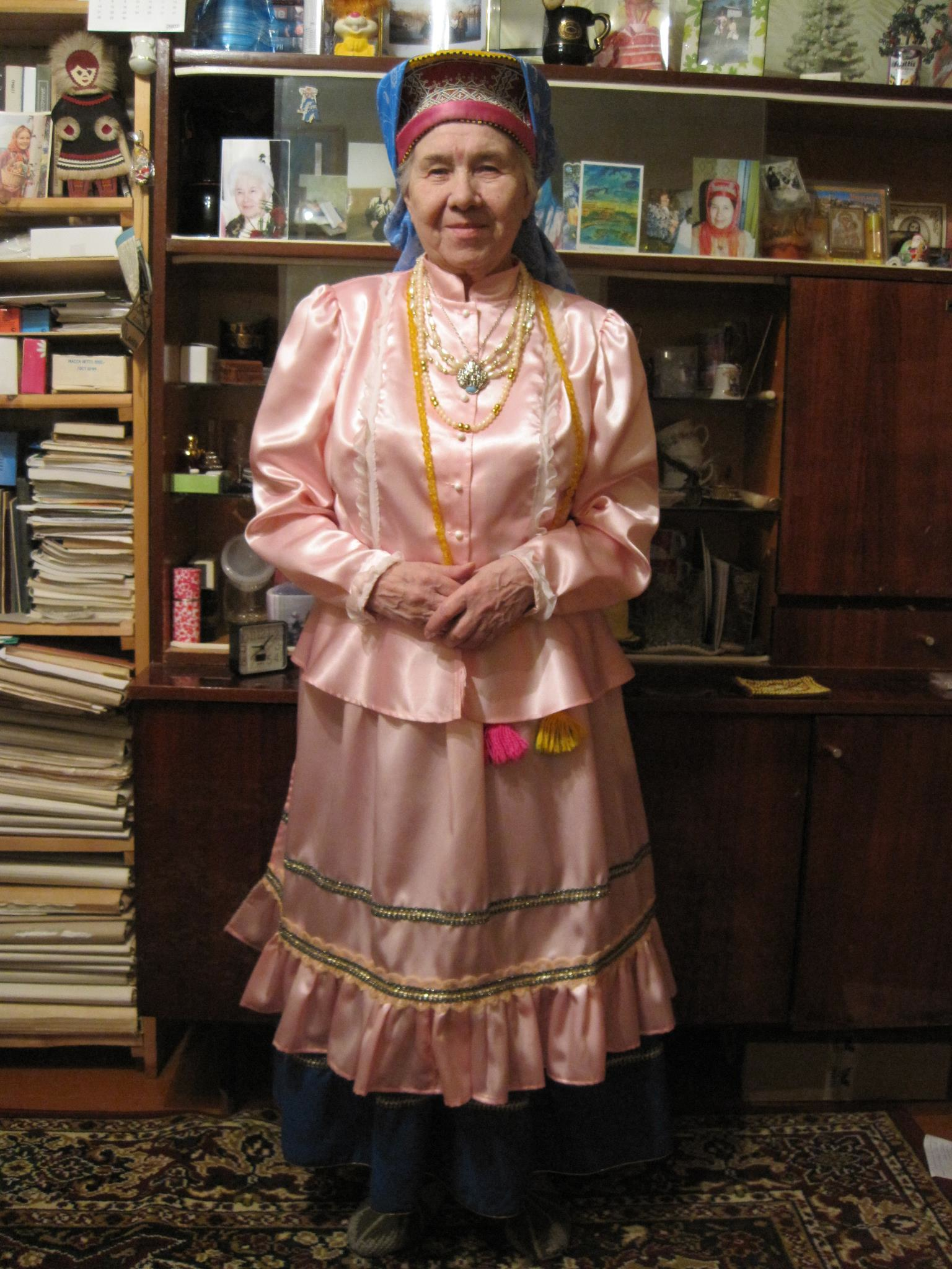 Александра Андреевна Антонова, саамская поэтесса из Ловозера